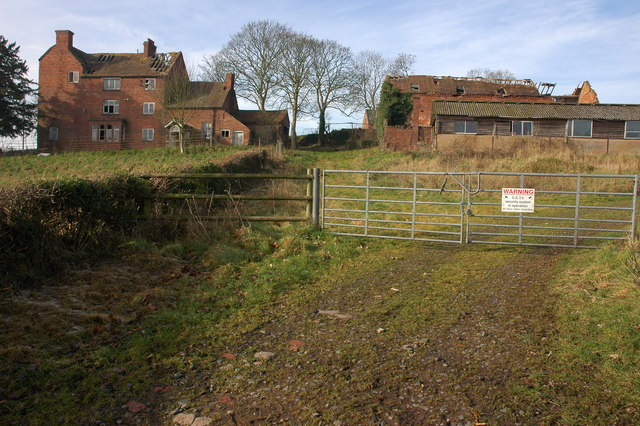 Castle Hill Farm, Kingsford